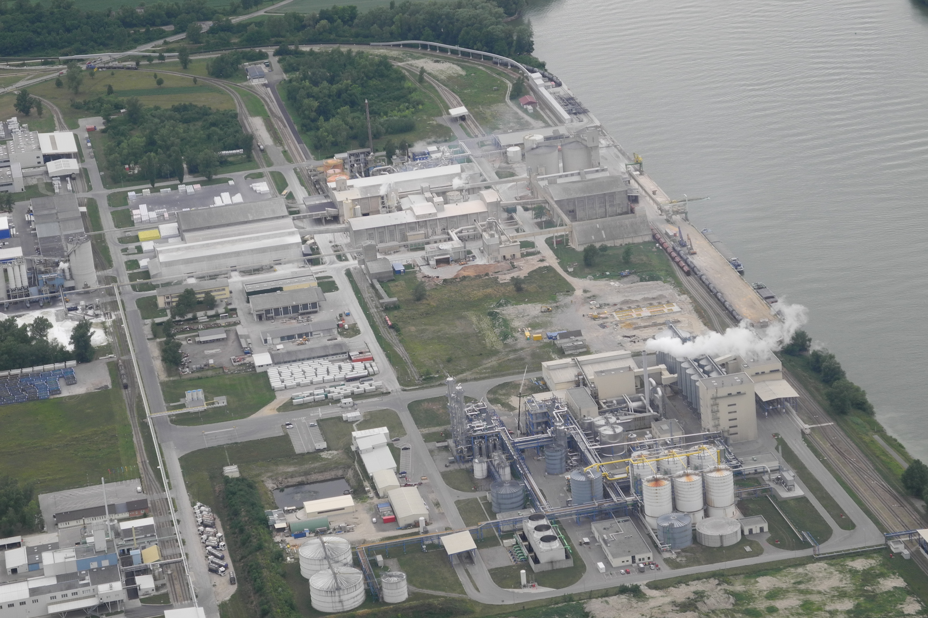 Donau Chemie Tulln VFR Ostösterreich Donau Chemie in Pischelsdorf, Gemeinde Zwentendorf